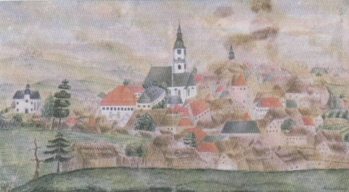 Ansicht von Münchberg um 1800 vor dem Stadtbrand (von 1837)